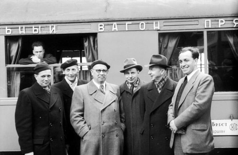 Abreise Lothar Bolz mit Architekten nach Moskau Illus/Rudolph Deutsche Regierungsdelegation fährt nach Moskau. Am 12.4.1950 begab sich eine Delegation unter Führung des Ministers für Aufbau, Dr. Lothar Bolz nach Moskau, um in der Sowjetunion die sowjetischen Methoden der Städteplanung und des Wiederaufbaus zerstörter Städte zu studieren. UBz: Die Delegation auf dem Schlesischen Bahnhof in Berlin, Die Delegation vor ihrer Abreise. V.l.n.r.: Leucht, Collein, Dr. Bolz, Alder, Piesternick, Dr. Liebknecht Abgebildete Personen: Bolz, Lothar Dr. jur.: Stellvertretender Ministerratsvorsitzender, Außenminister, DDR Leucht, Kurt Dipl. Ing.: Architekt, Leiter der Abteilung Städteplanung im Ministerium für Aufbau, DDR (GND 126192987) Liebknecht, Kurt: Präsident der Deutschen Bauakademie, DDR